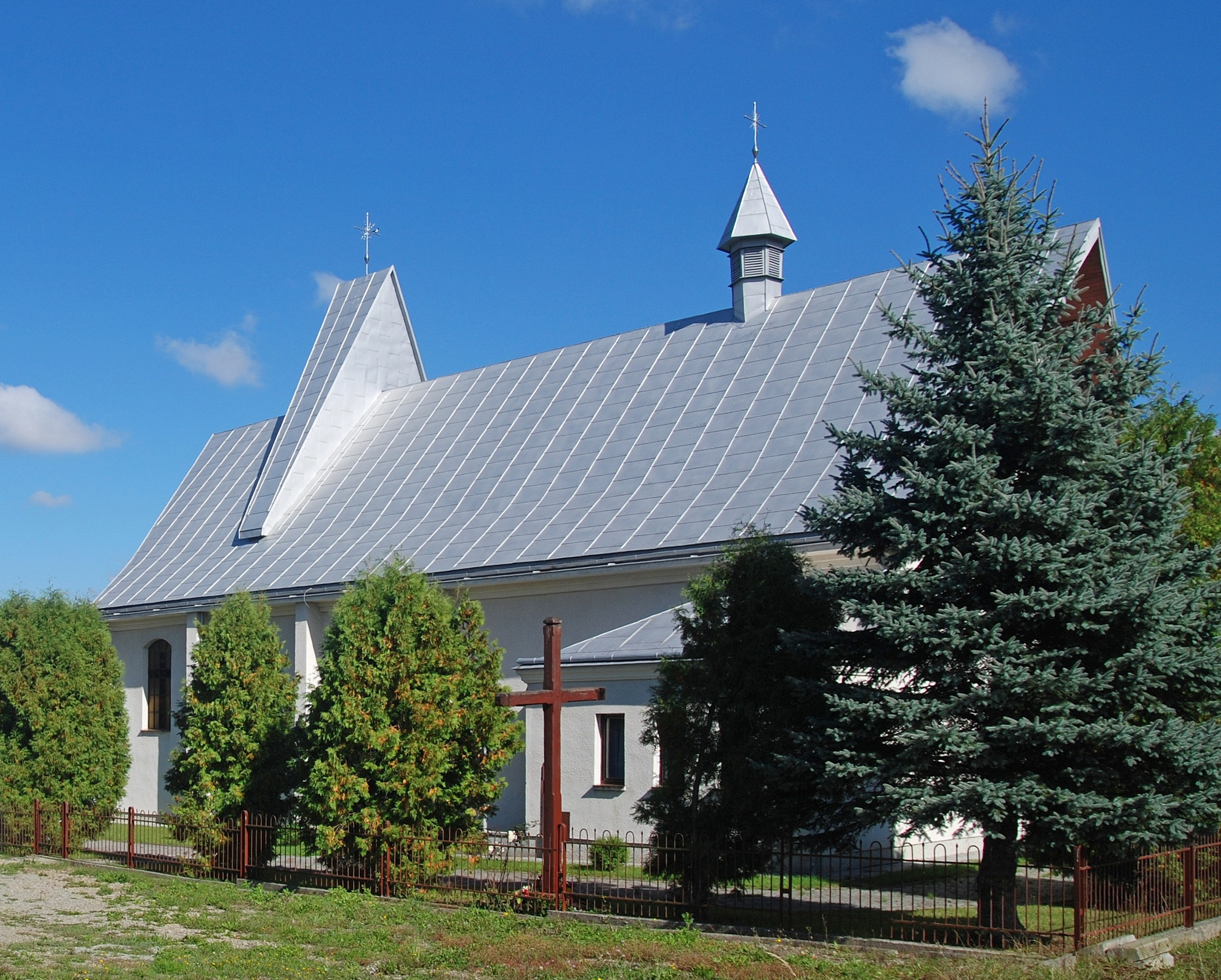 wieś Makowiska (powiat jasielski)